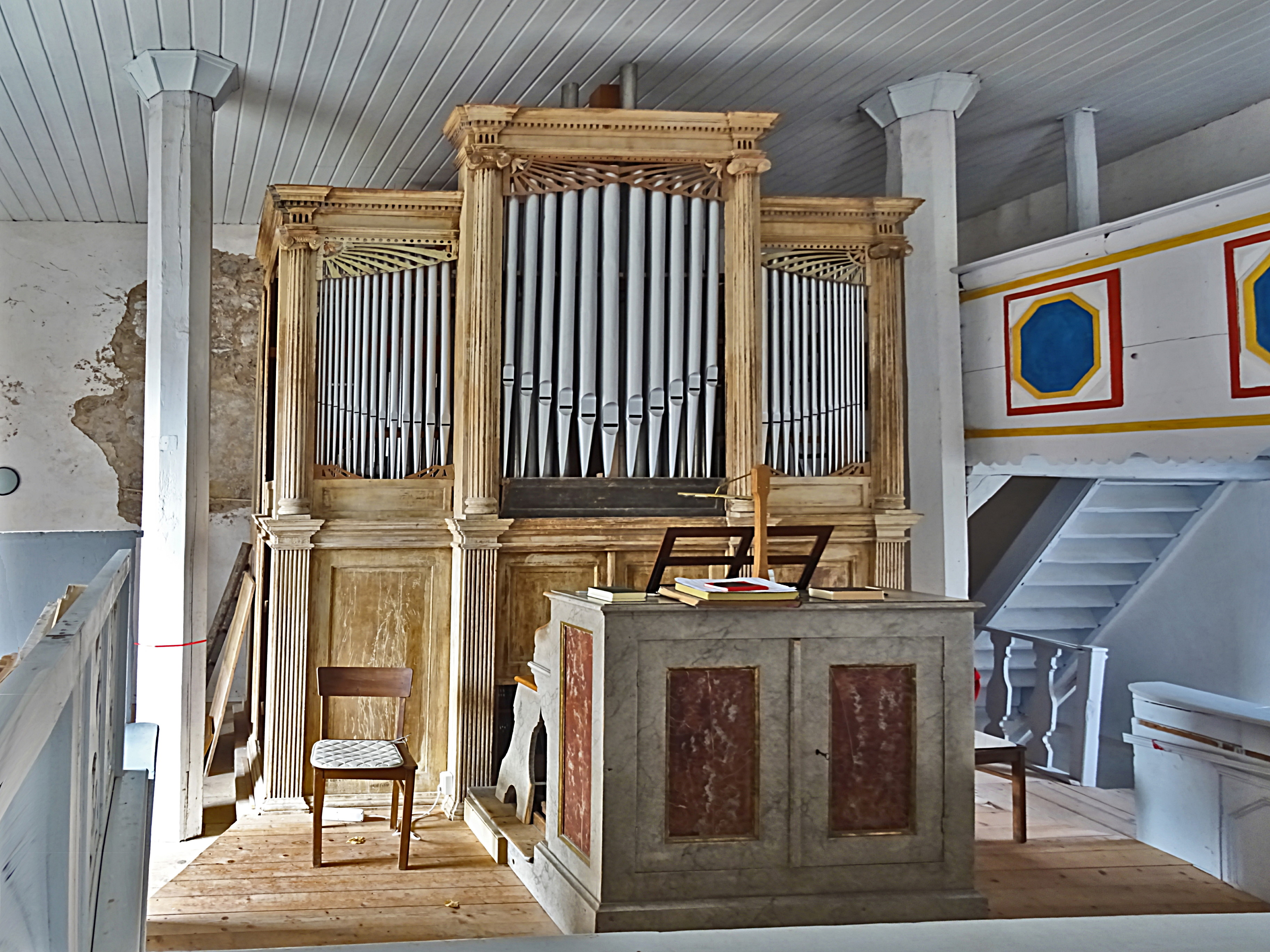 Orgel in St. Petri Liebenrode von Georg Kiessling & Söhne (1926, II/P 10) im Gehäuse von F. Knauf (1835), stark renovierungsbedürftig